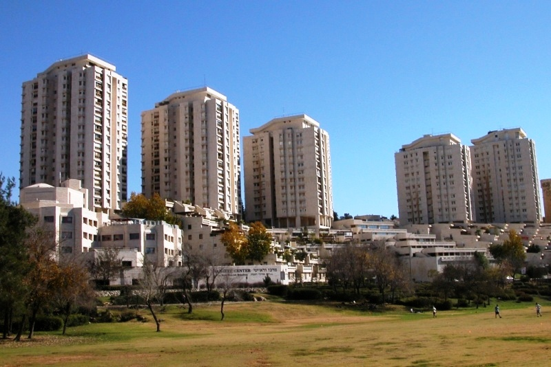 ירושלים - מבט מגן סאקר לבניני וולפסון